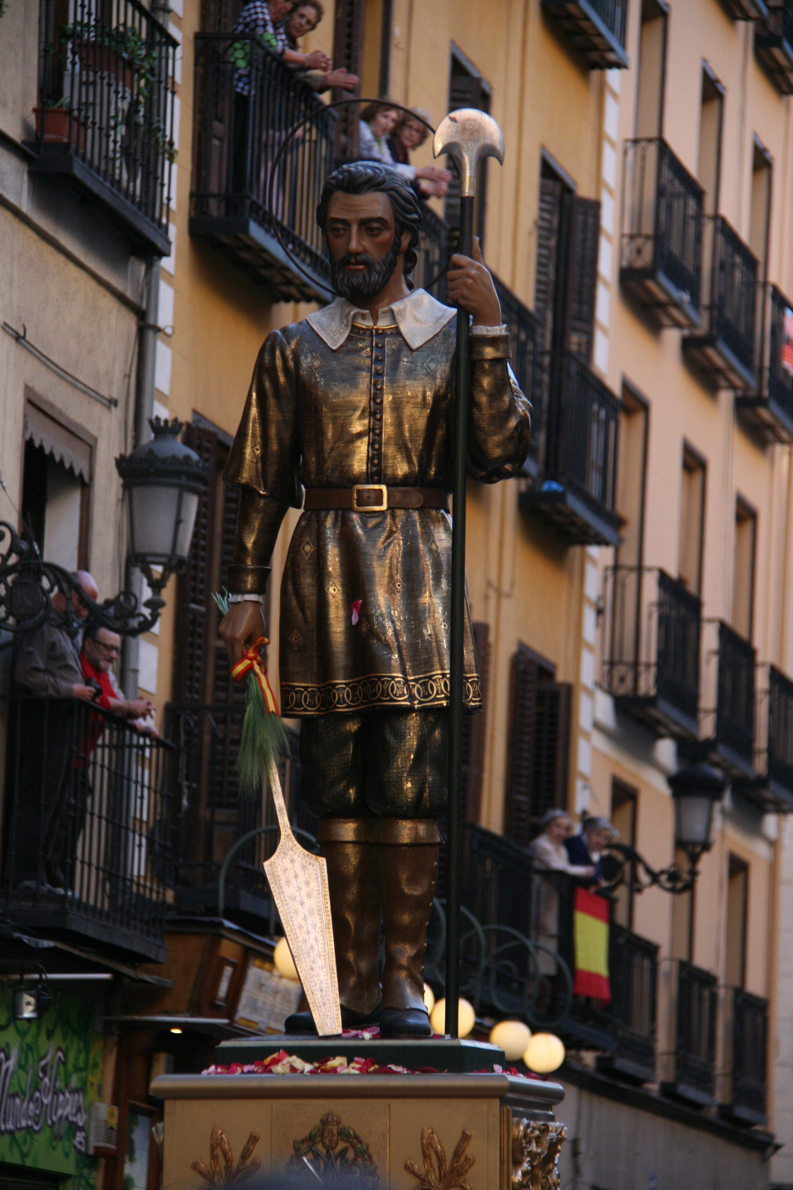 Procesión de San Isidro Labrador - Calle Toledo